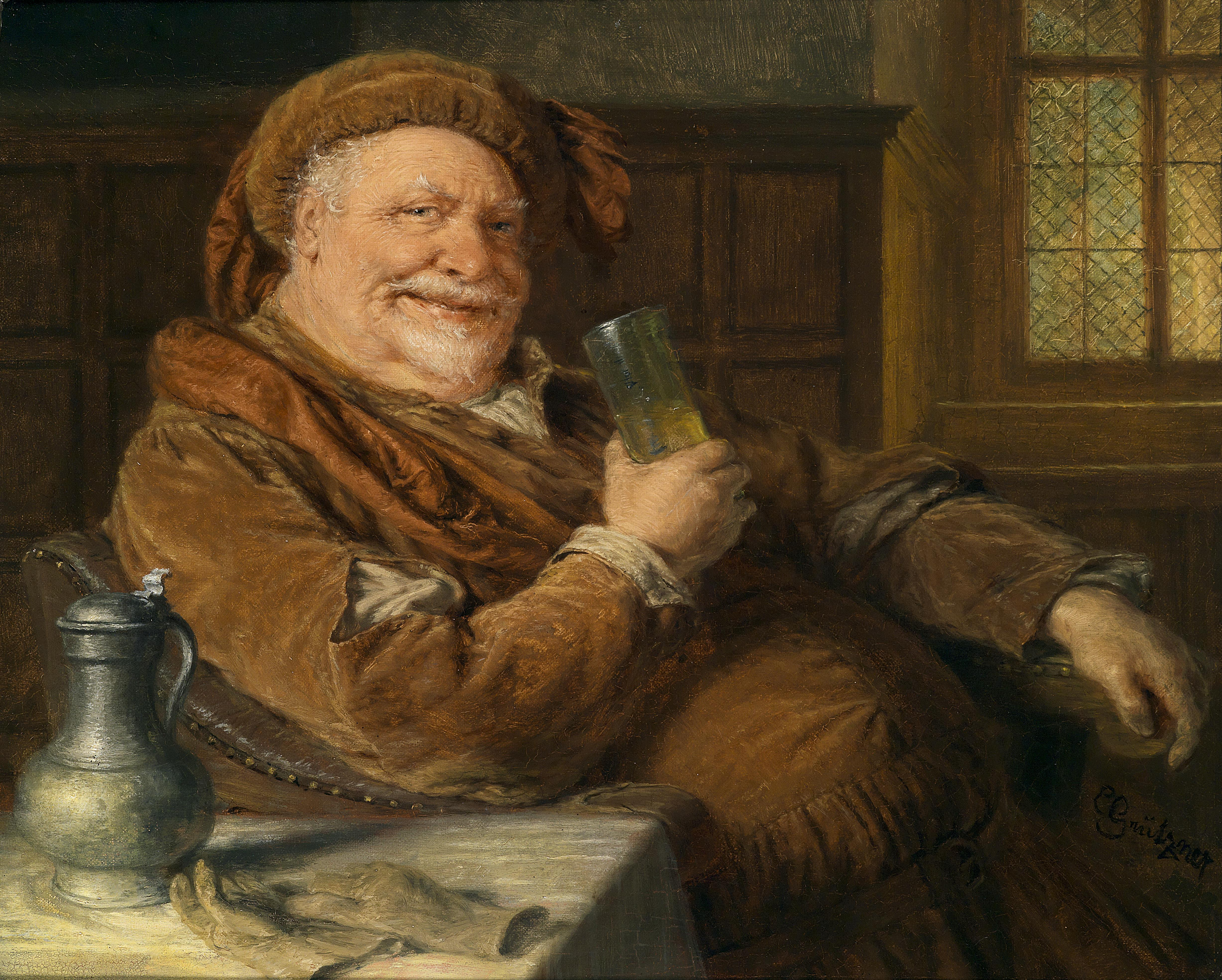 Falstaff mit Zinnkanne und Weinglas, signiert E. Grützner, Öl auf Leinwand, 37 x 46 cm